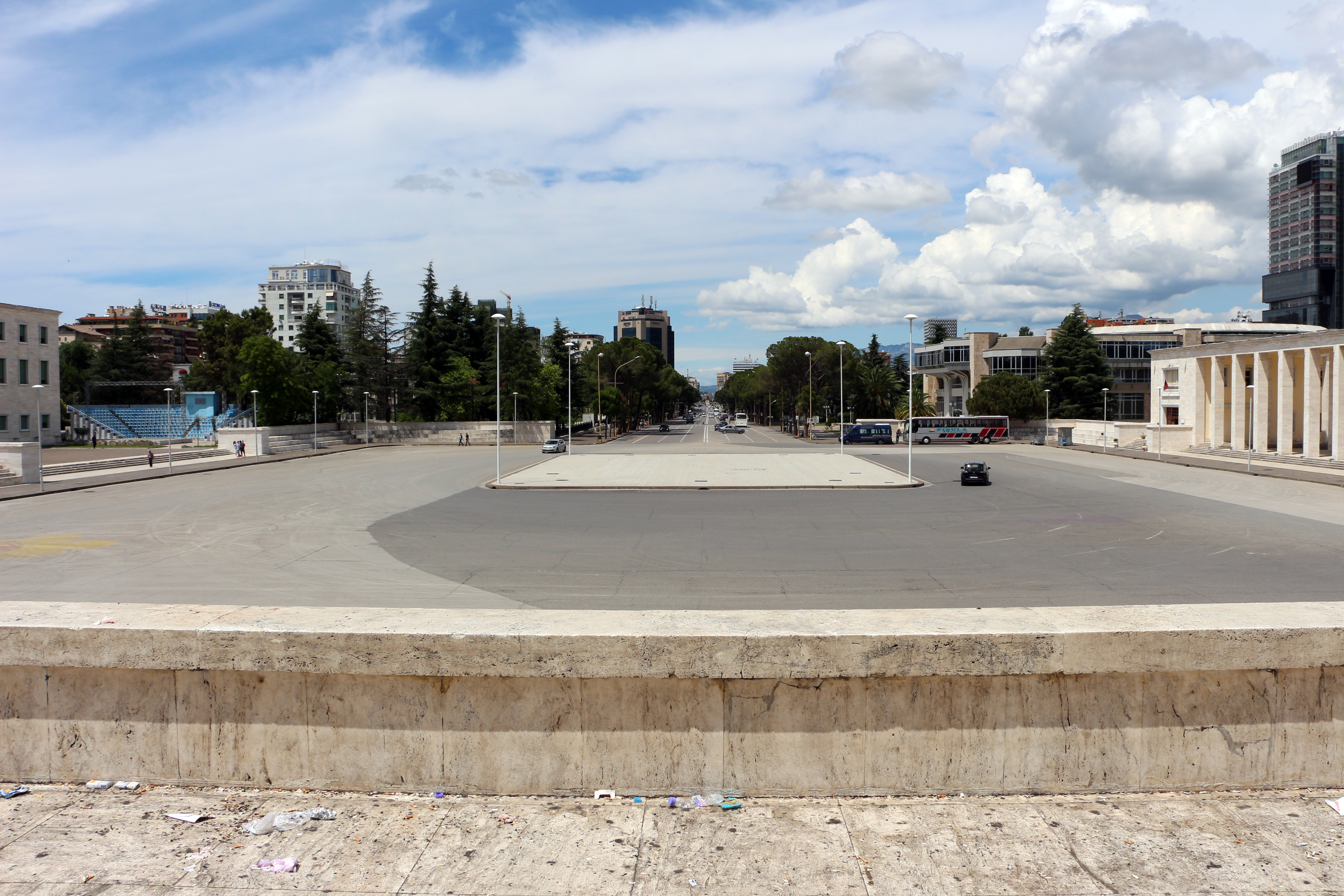 Muzeu Arkeologjik